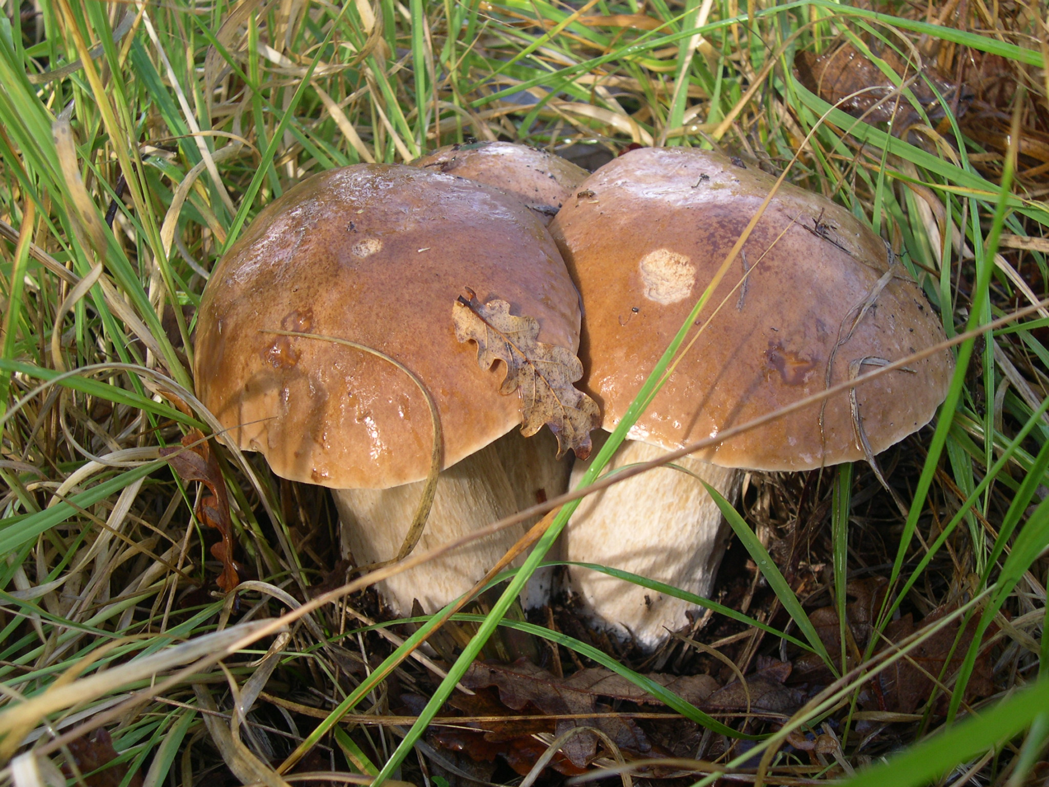 Un groupe de trois cèpes.